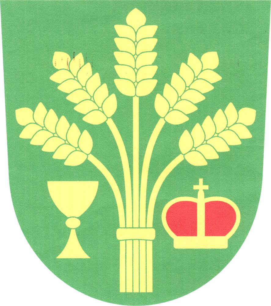 Znak obce Vysoká (okres Mělník)